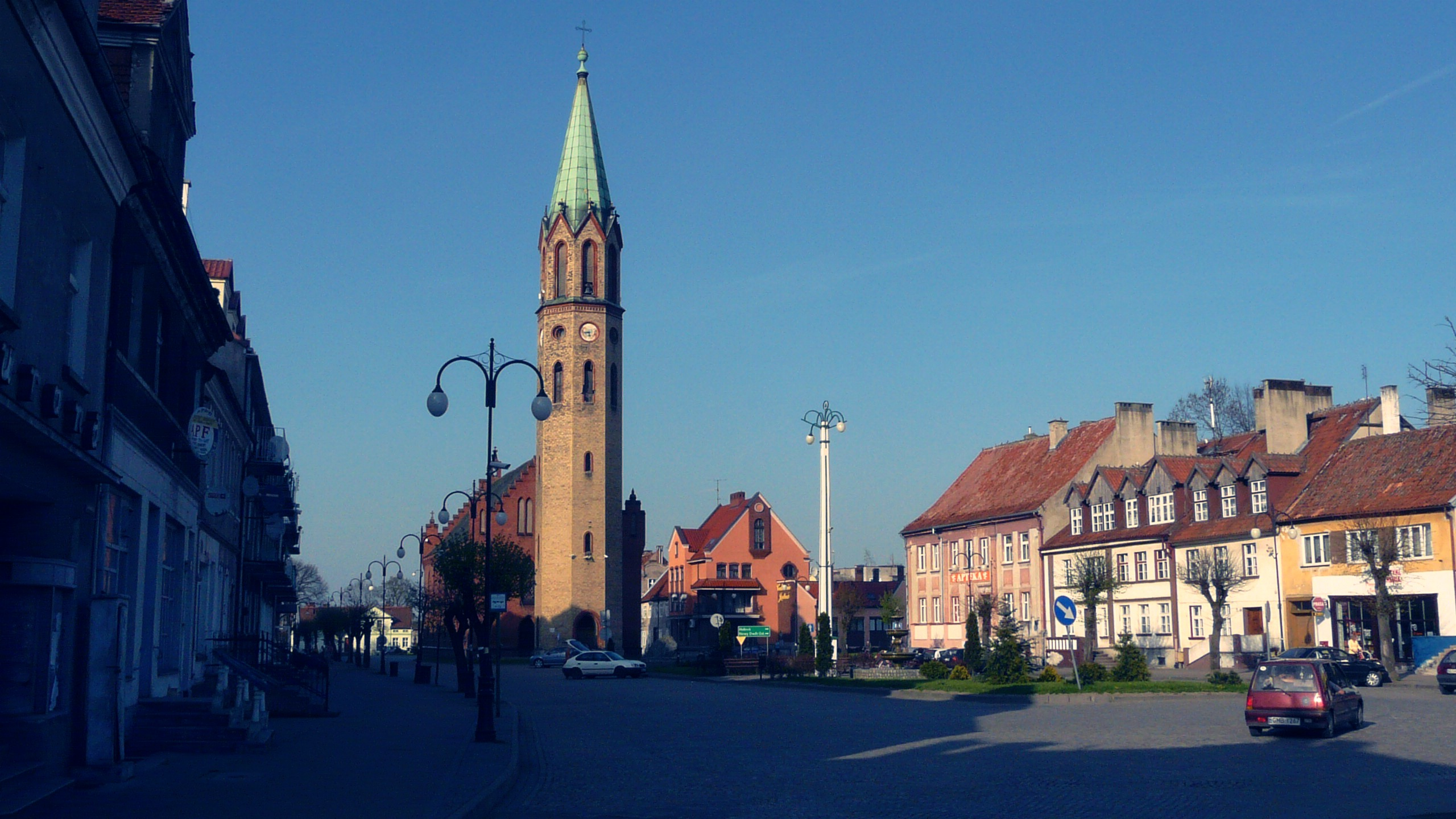 Dawny kościół ewangelicki – wybudowany w stylu neogotyckim w latach 1803-1804 na miejscu spalonego w 1802 ratusza. w 1863 roku dobudowano wieżę nazywaną "ołówkiem", ze względu na swój charakterystyczny kształt. Przy przebudowie w latach 1898-1899 dobudowano zakrystię i zamurowano wejście do starych, być może średniowiecznych piwnic. Obecnie nie używany do celów kultowych.